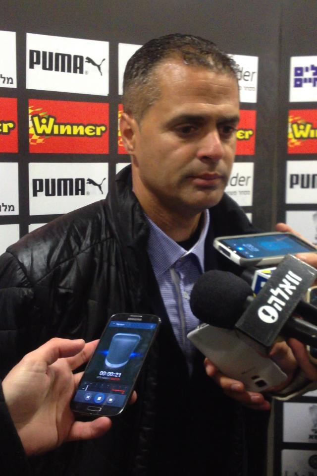 אלון חרזי במסיבת עיתונאים כמאמן הפועל עכו